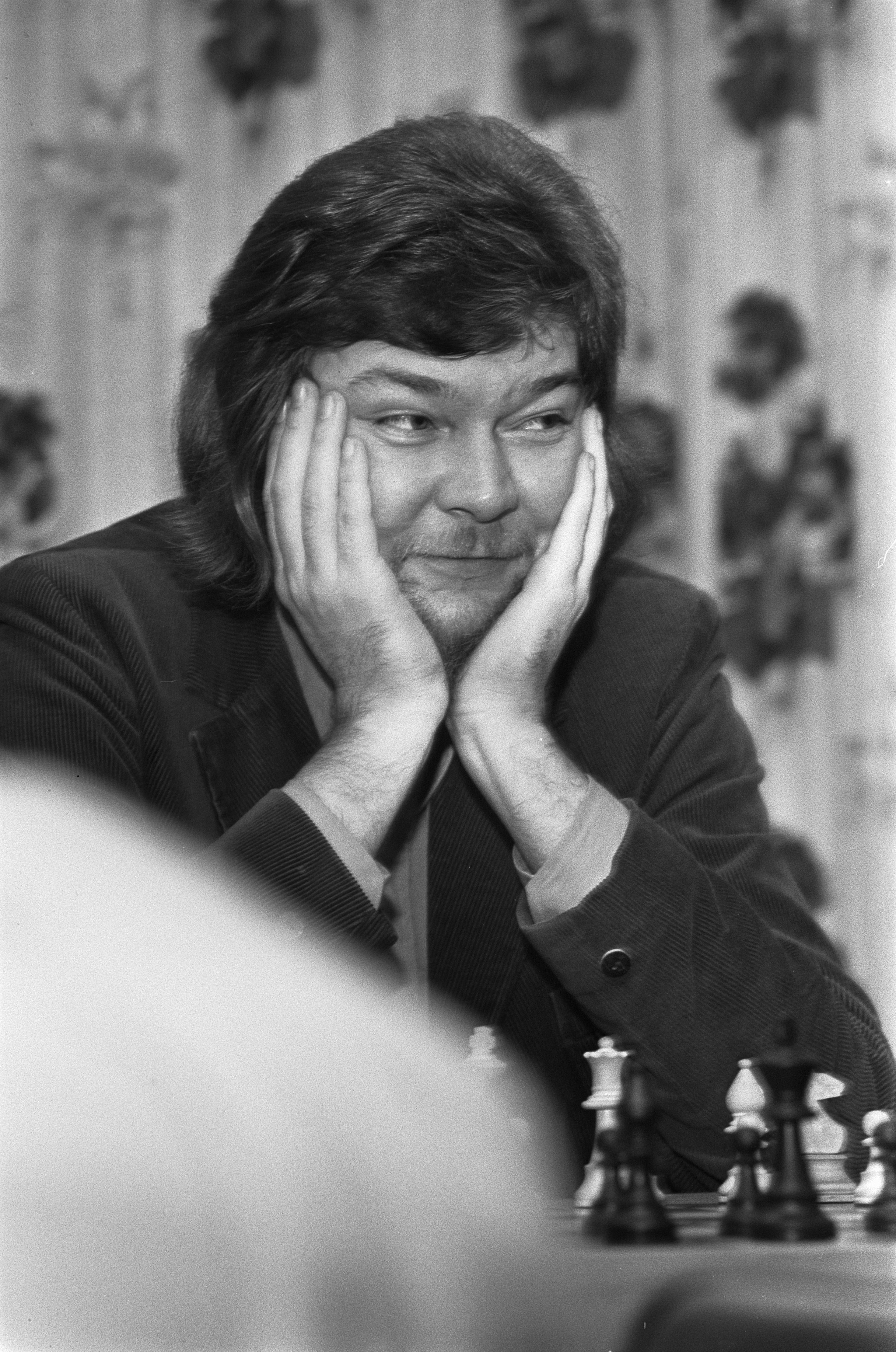 Hoogoven-schaaktoernooi te Wijk aan Zee 1973, nummer 7 R. G. Hartoch.